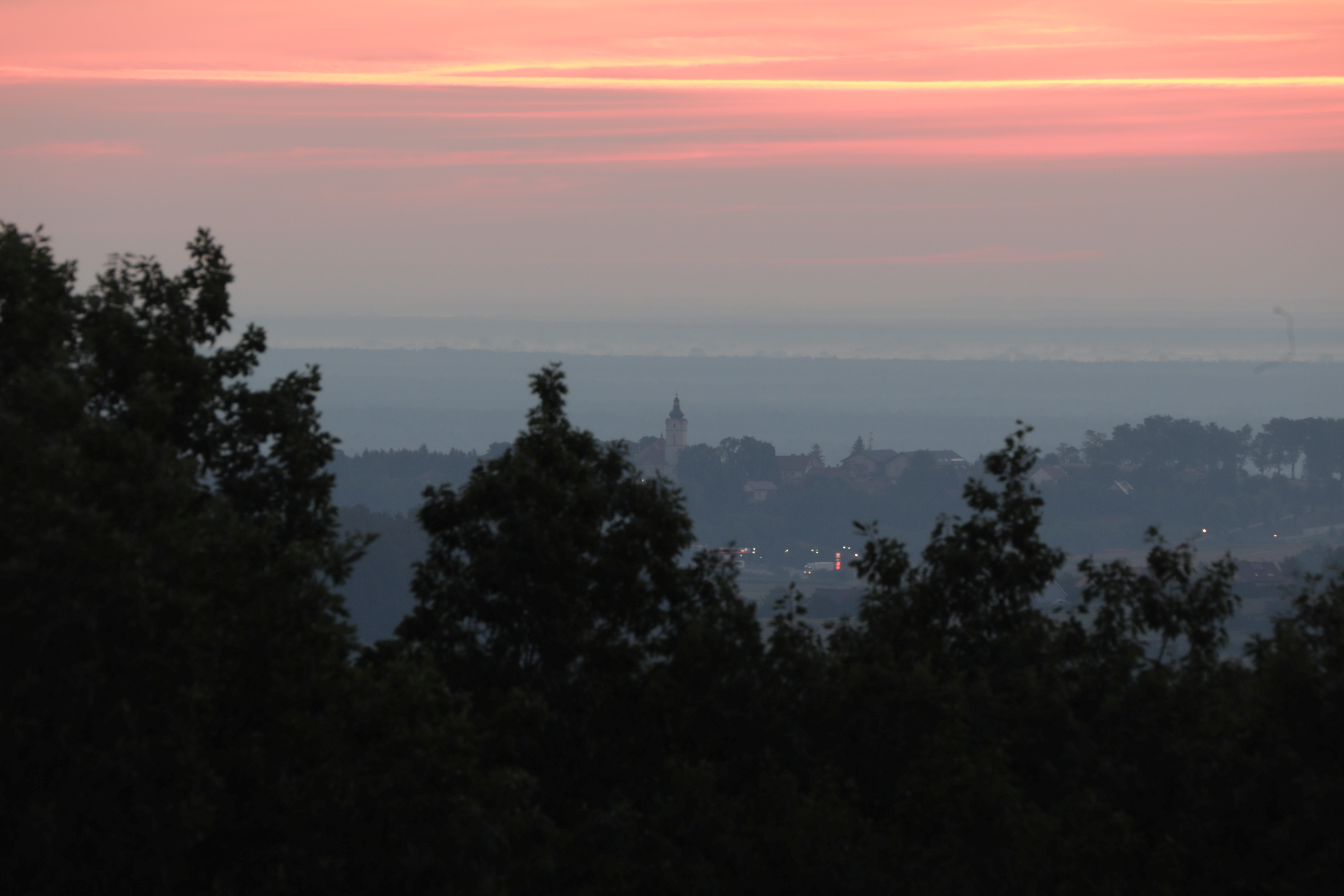 Świt. Widok na Puszczę Niepołomicką i Brzezie z wzgórz nad Biskupicami. Zdjęcie wykonanie osiem minut przed pojawieniem się Słońca na horyzoncie.